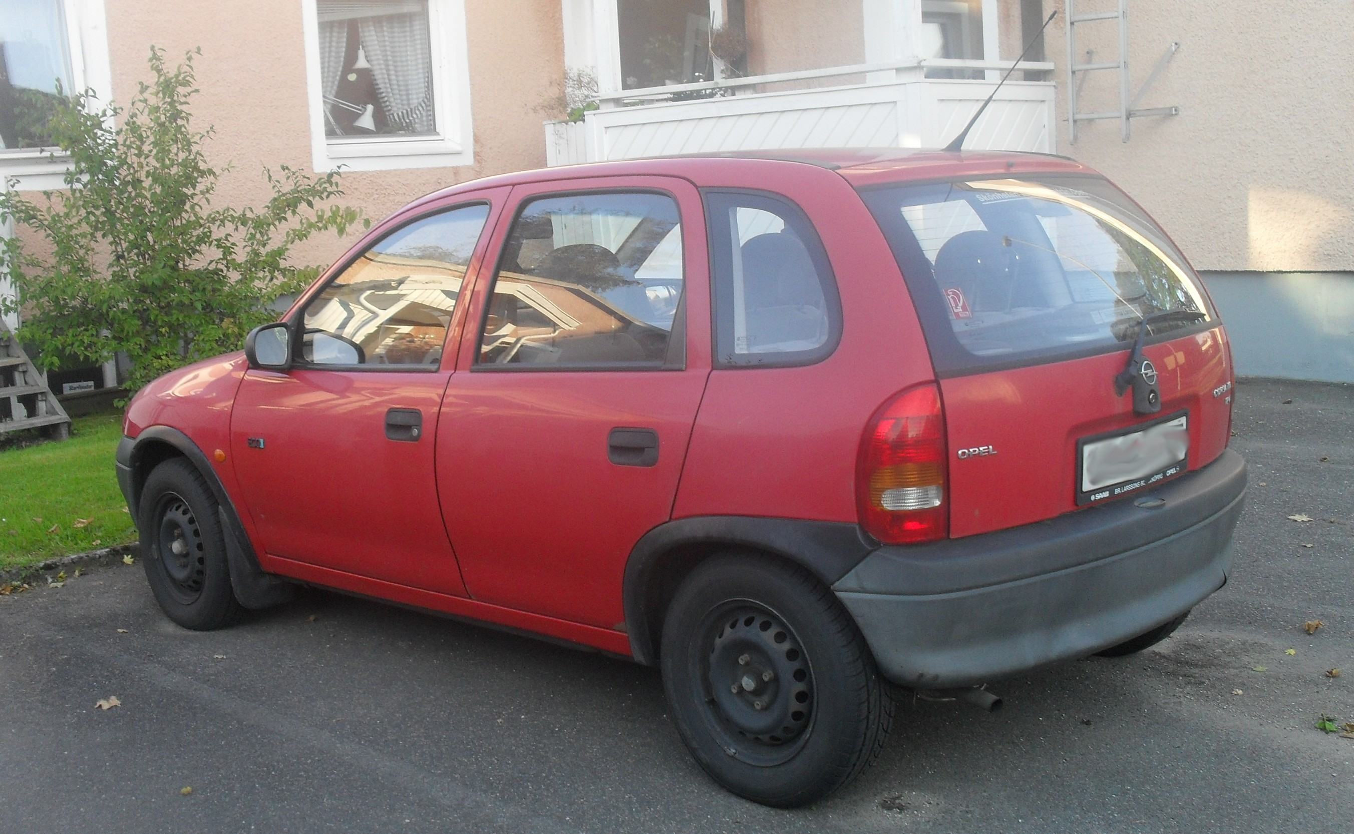 Opel Corsa 10 ECO